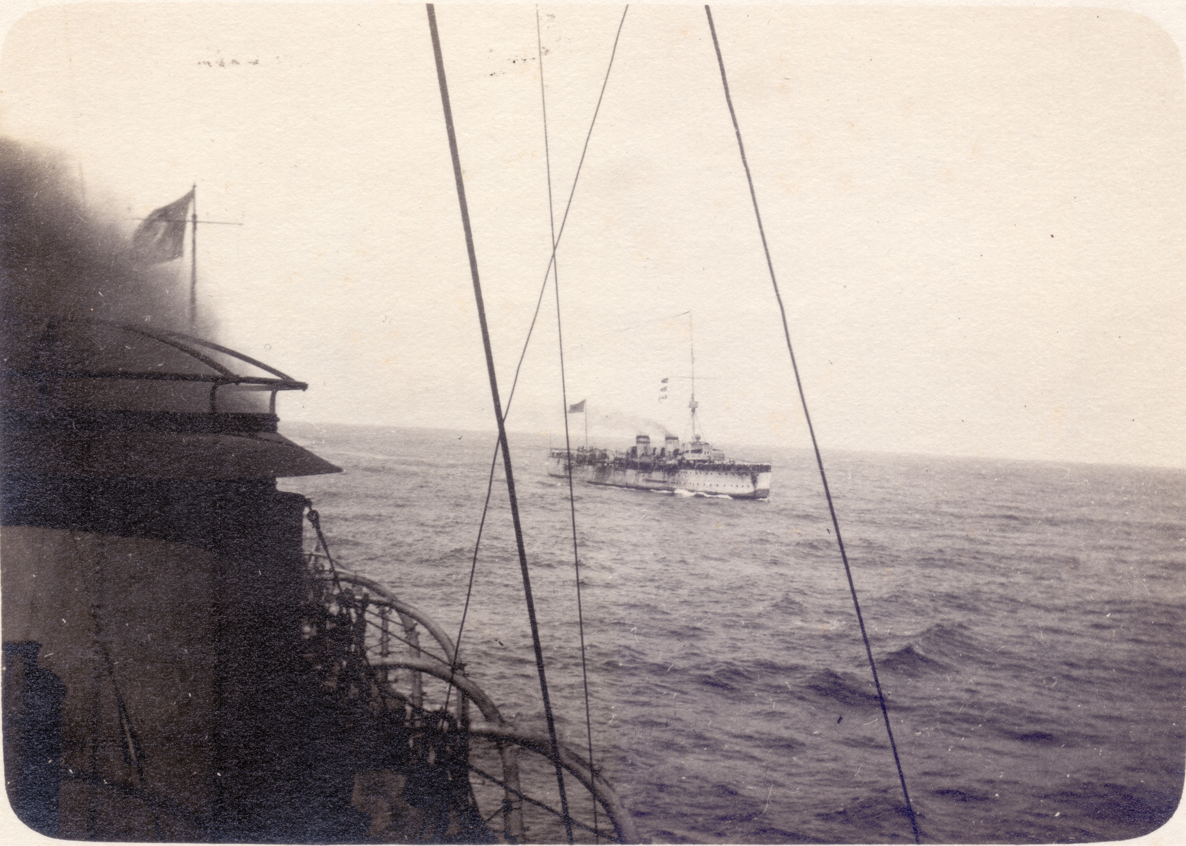 O Cruzador Rio Grande do Sul visto do Contratorpedeiro Piauí, em Gibraltar, 1919. Arquivo liberado pela Marinha do Brasil através de projeto GLAM com Wiki Educação Brasil